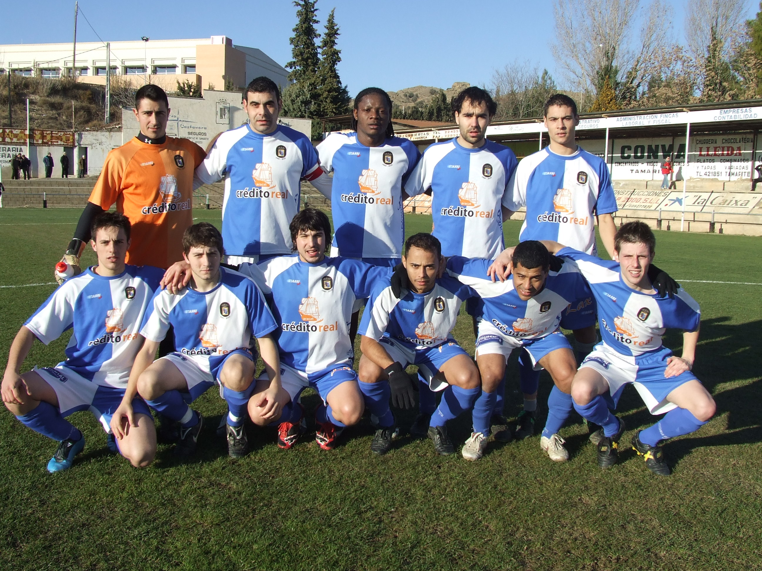 Tamarite 1 - Altorricón 1 (20-12-2009)